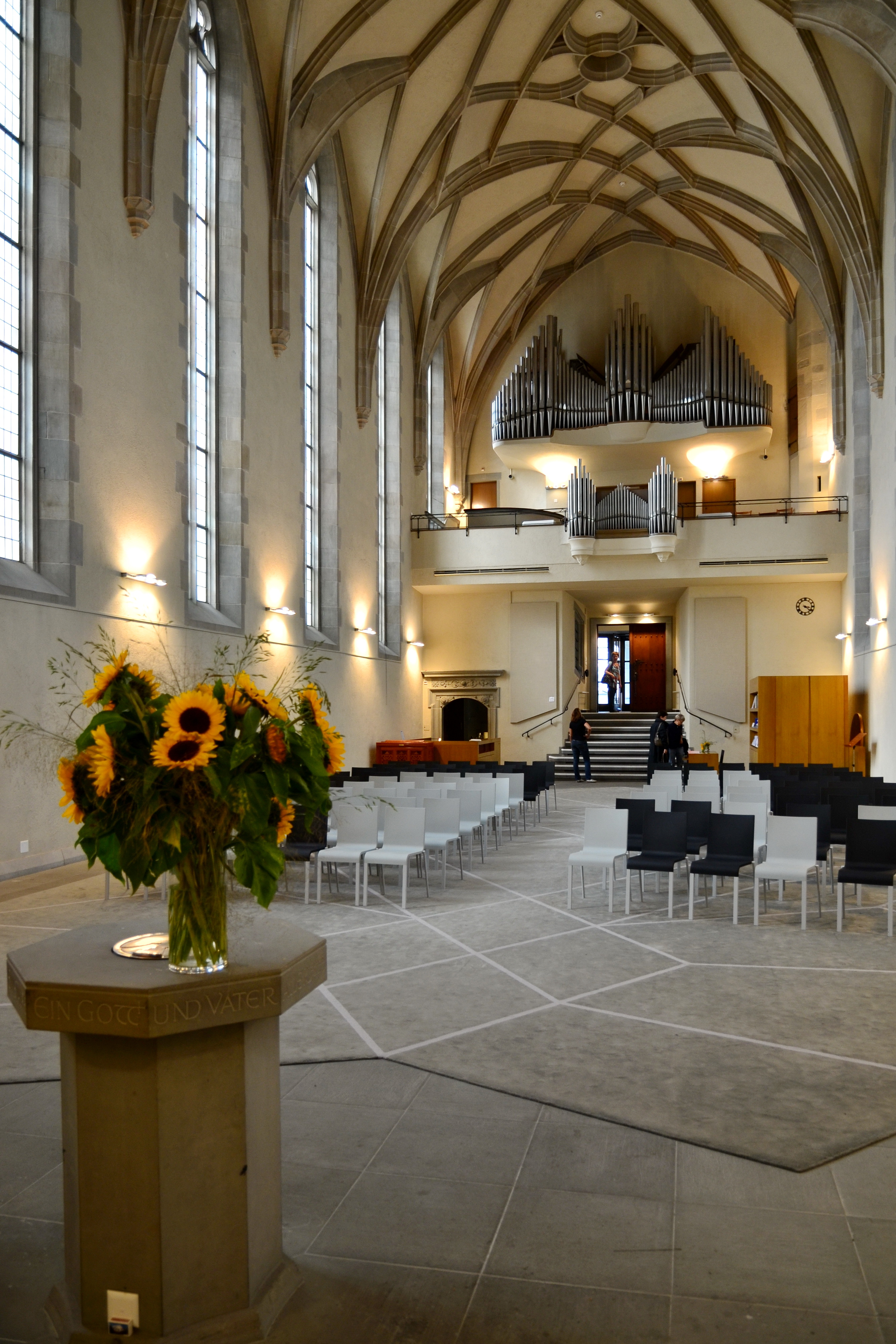 Wasserkirche in Zürich